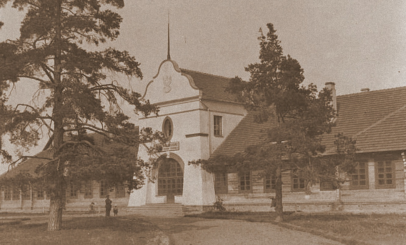 Koszary batalionu KOP Sienkiewicze